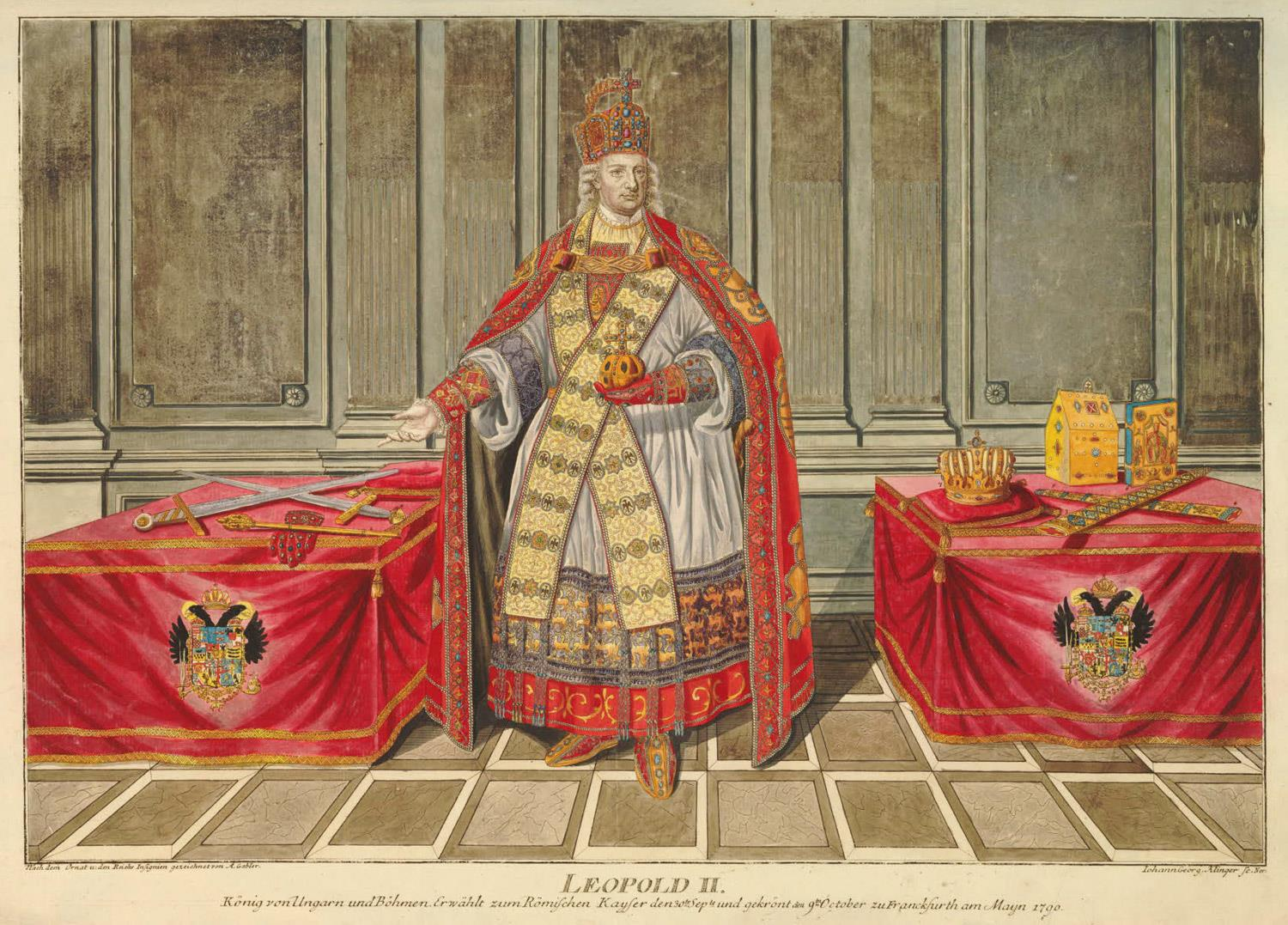 Kaiser Leopold II. mit den Reichskleinodien und Heiltümern, kolorierter Stich von 1790.